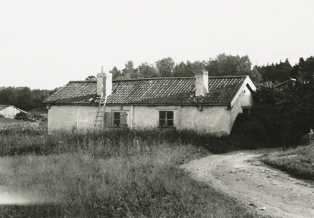 Torpet Starrmyra i Hökarängen (lydde tidigare under Årsta gård)